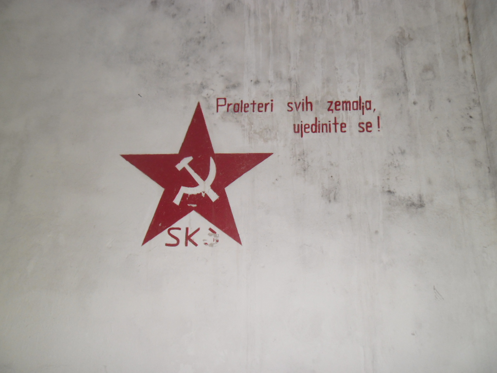 zapušteni vojni objekt bivše JRM (JNA) u Pasaduru na otoku Lastovu